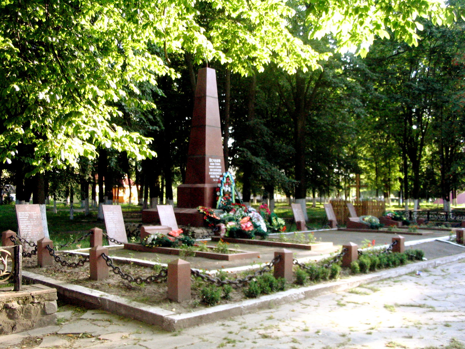 Пам'ятник радянським воїнам, що загинули у війну. Розташований в невеличному парку, котрий заснував колишній власник Емільчино граф Уваров.